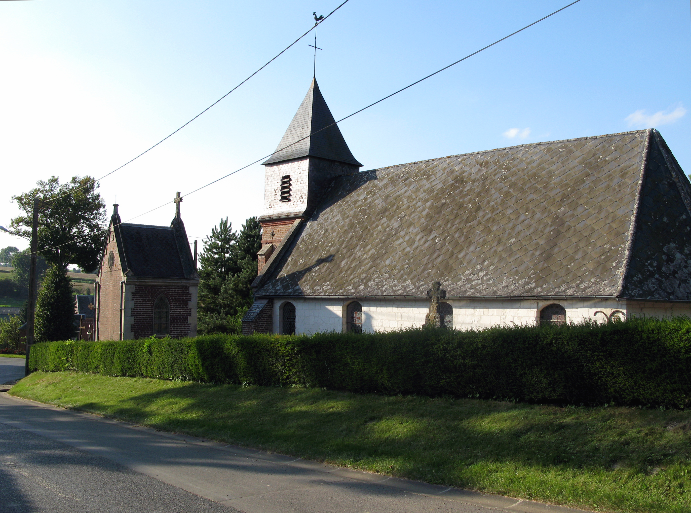 Bernâtre (Somme, France) - L'église. La photo a volontairement été prise sous un angle pouvant faire penser que le coq du clocher est posé sur le fil éléctrique.